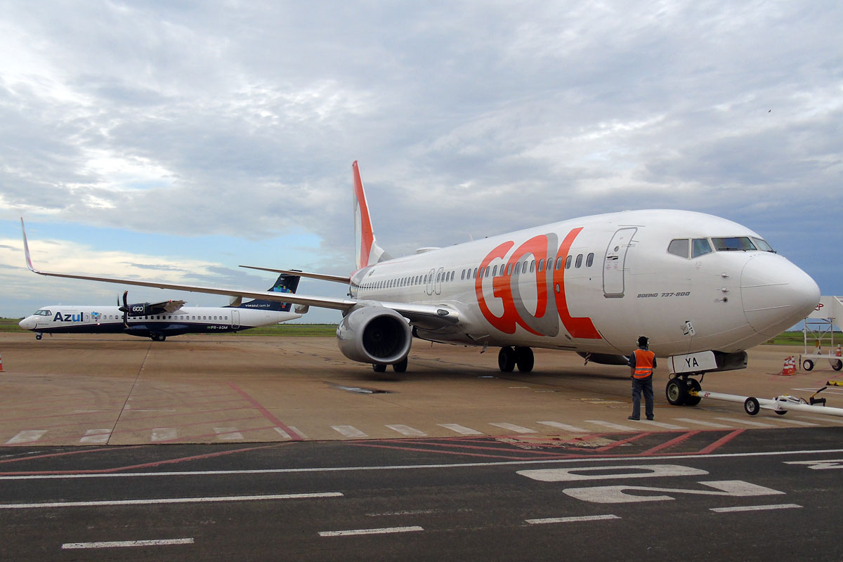 Boeing da Gol e ATR da Azul no Pátio do Aeroporto de Maringá/PR